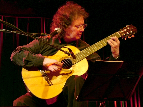 catalan guitarist Toti Soler performing live in Uesca